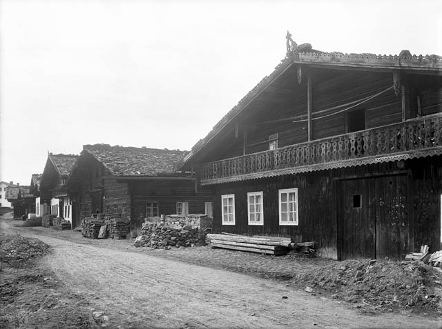 Volary